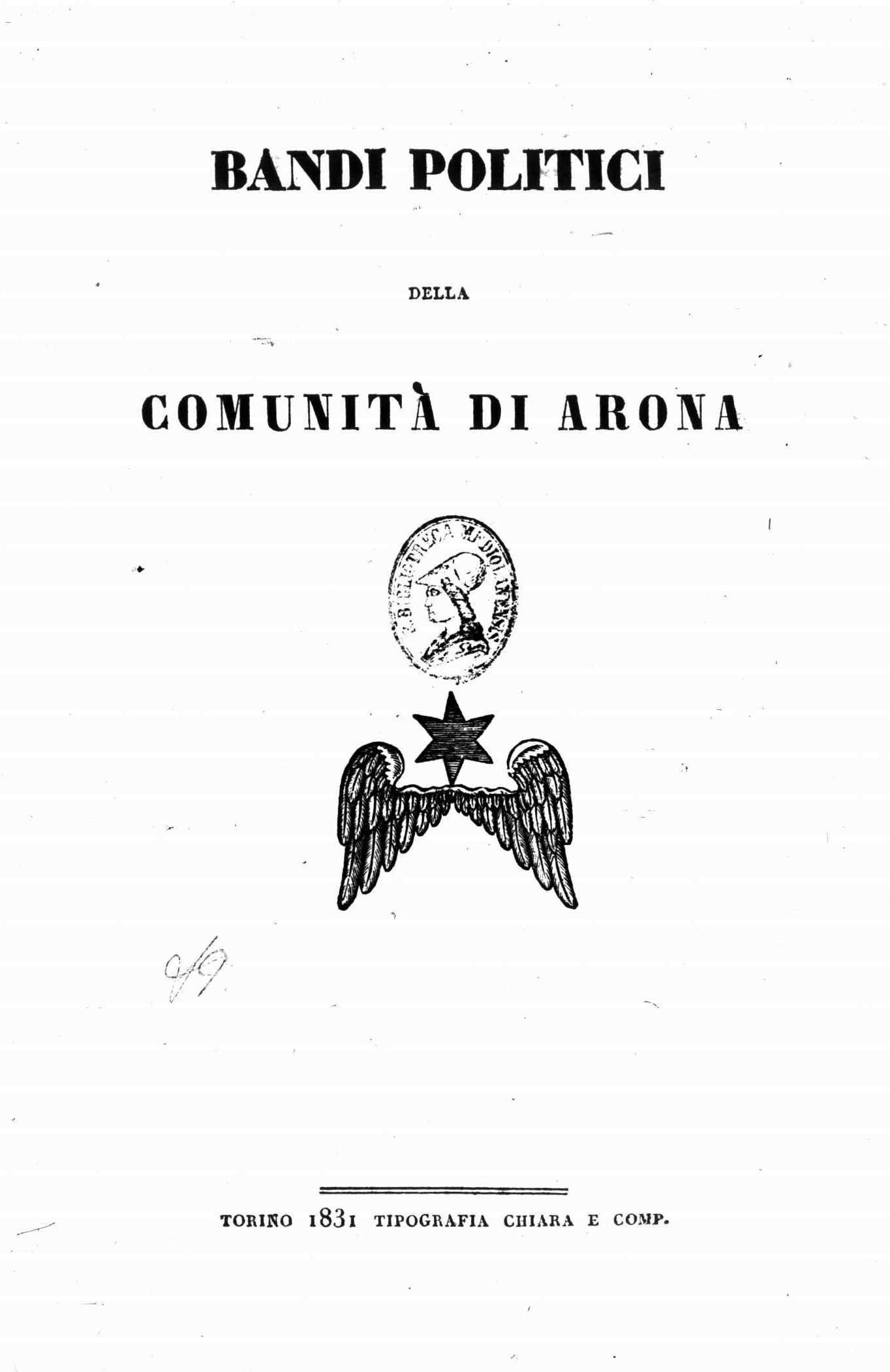 Frontespizio